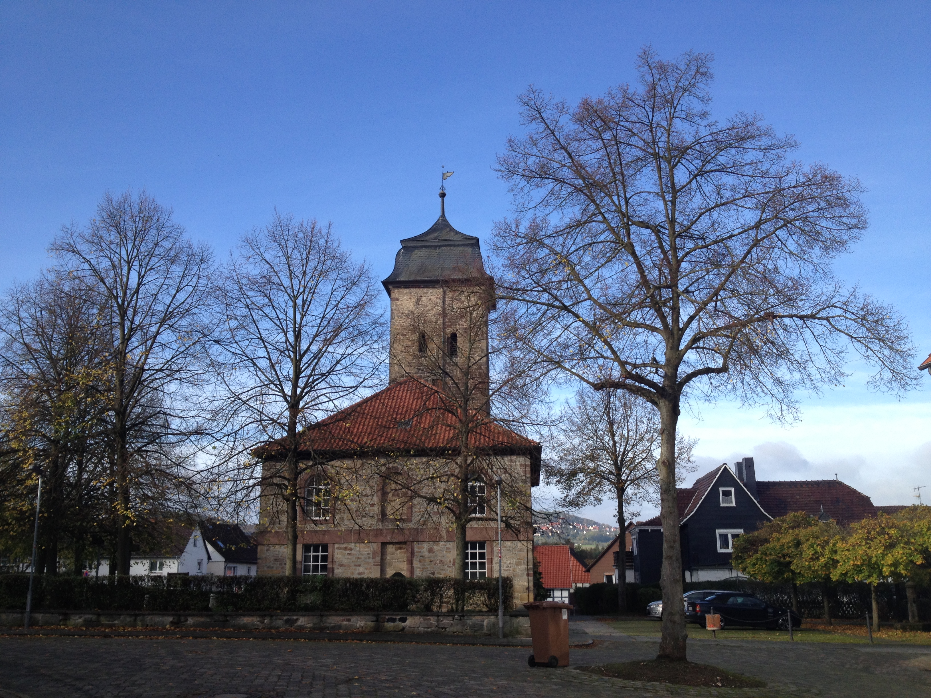 Die evangelische Kirche in Ehlen, fotografiert vom Kirchplatz östlich der Kirche; Eco Pfad Kulturgeschichte Habichtswald